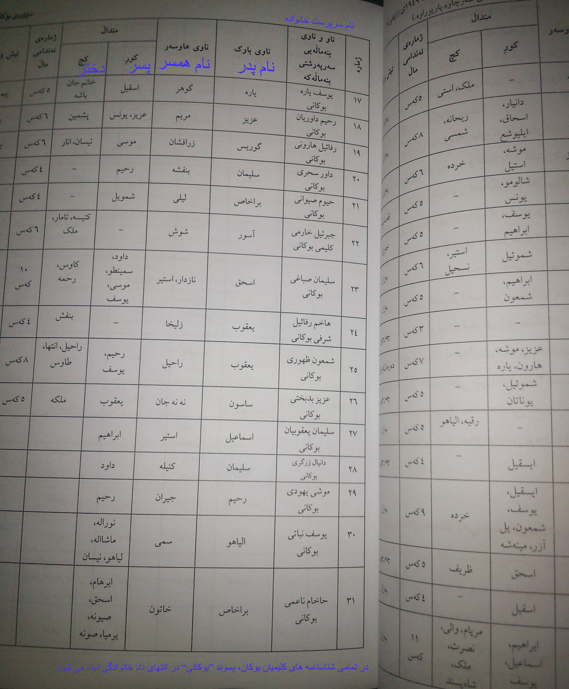 بخشی از فهرست 73 خانواده یهودی بوکان